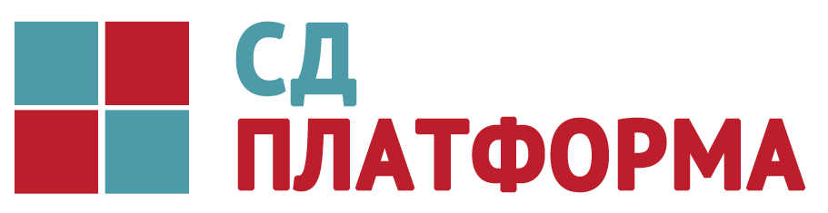 офіційний логотип організації